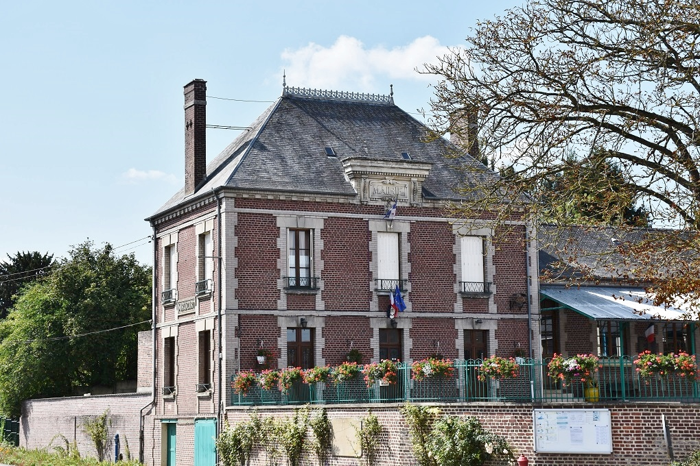 Mairie de Muirancourt (60).